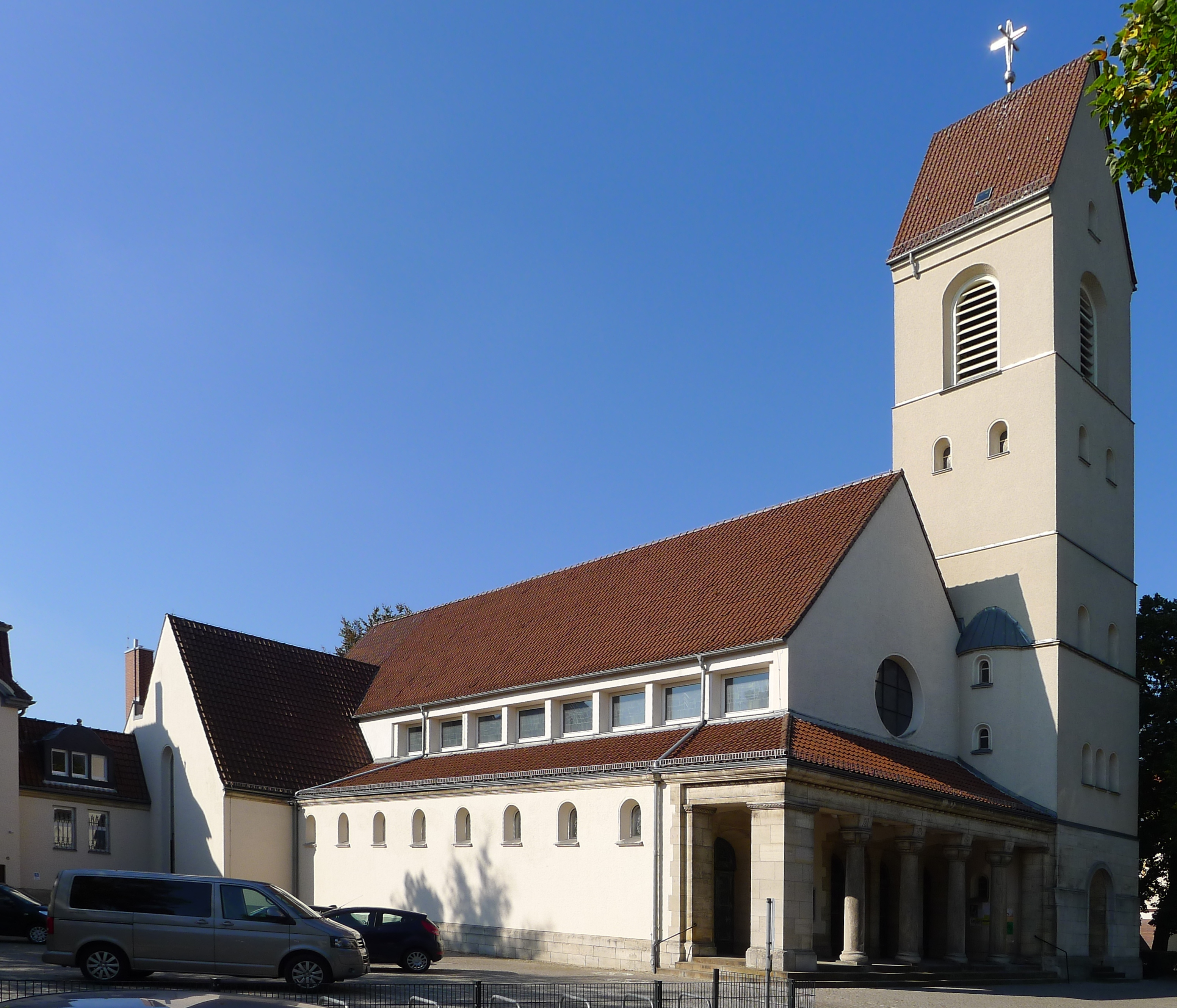 Blick auf die Kirche und den Glockenturm